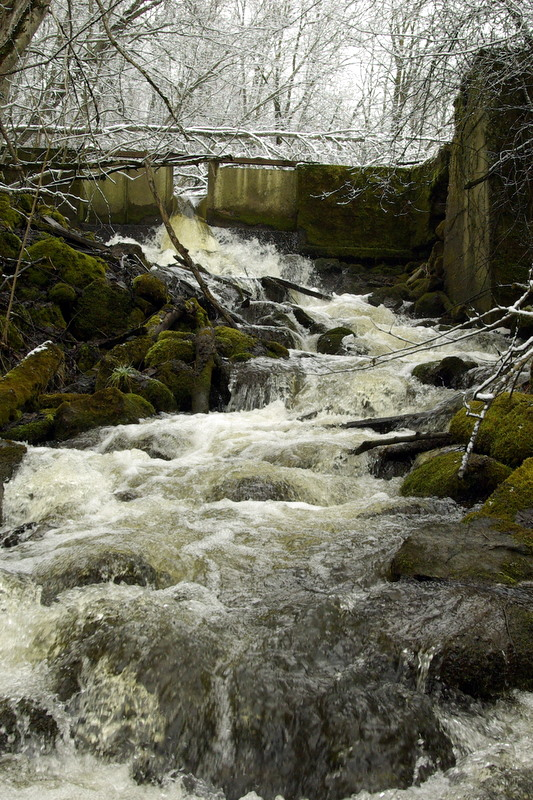 Utria juga.